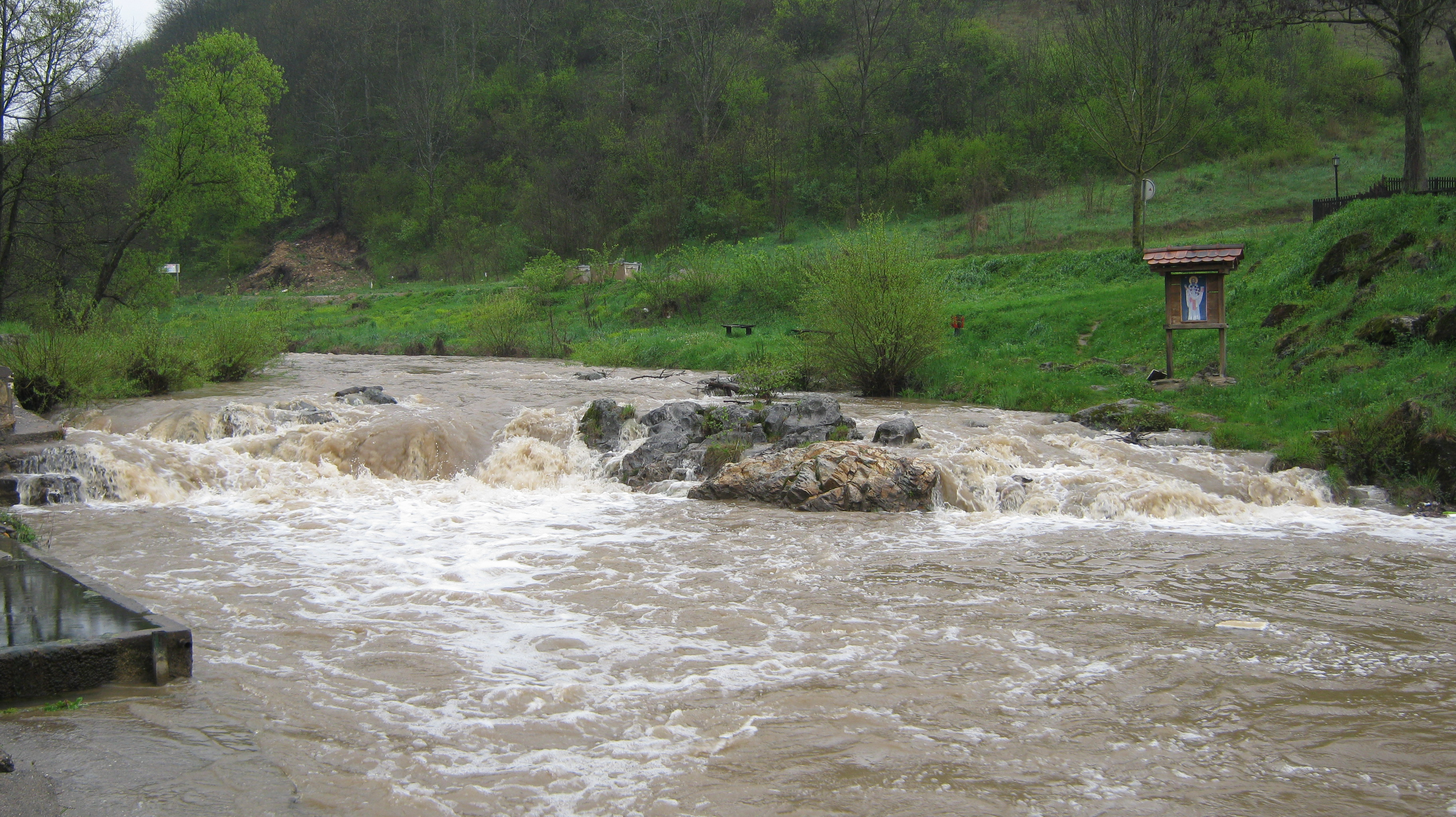 Дичина је река у Србији. Настаје на јужним падинама Сувобора и Рајца, од Велике и Мале Дичине. Код Прељине се као лева притока улива у реку Чемерницу, притоку Западне Мораве и припада црноморском сливу.